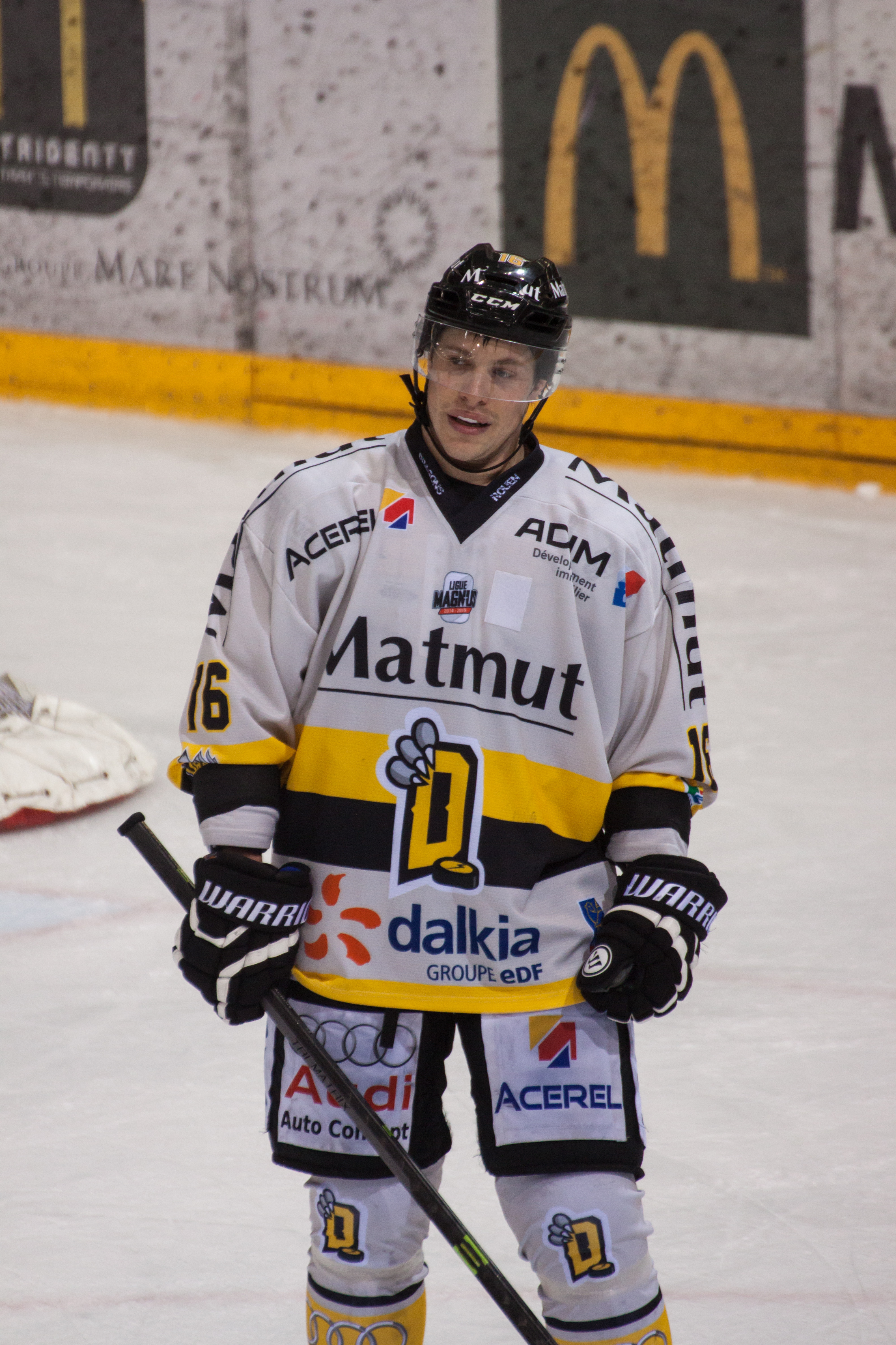 Maxime Lacroix lors du match Grenoble-Rouen le 24 octobre 2014 à la patinoire Polesud.